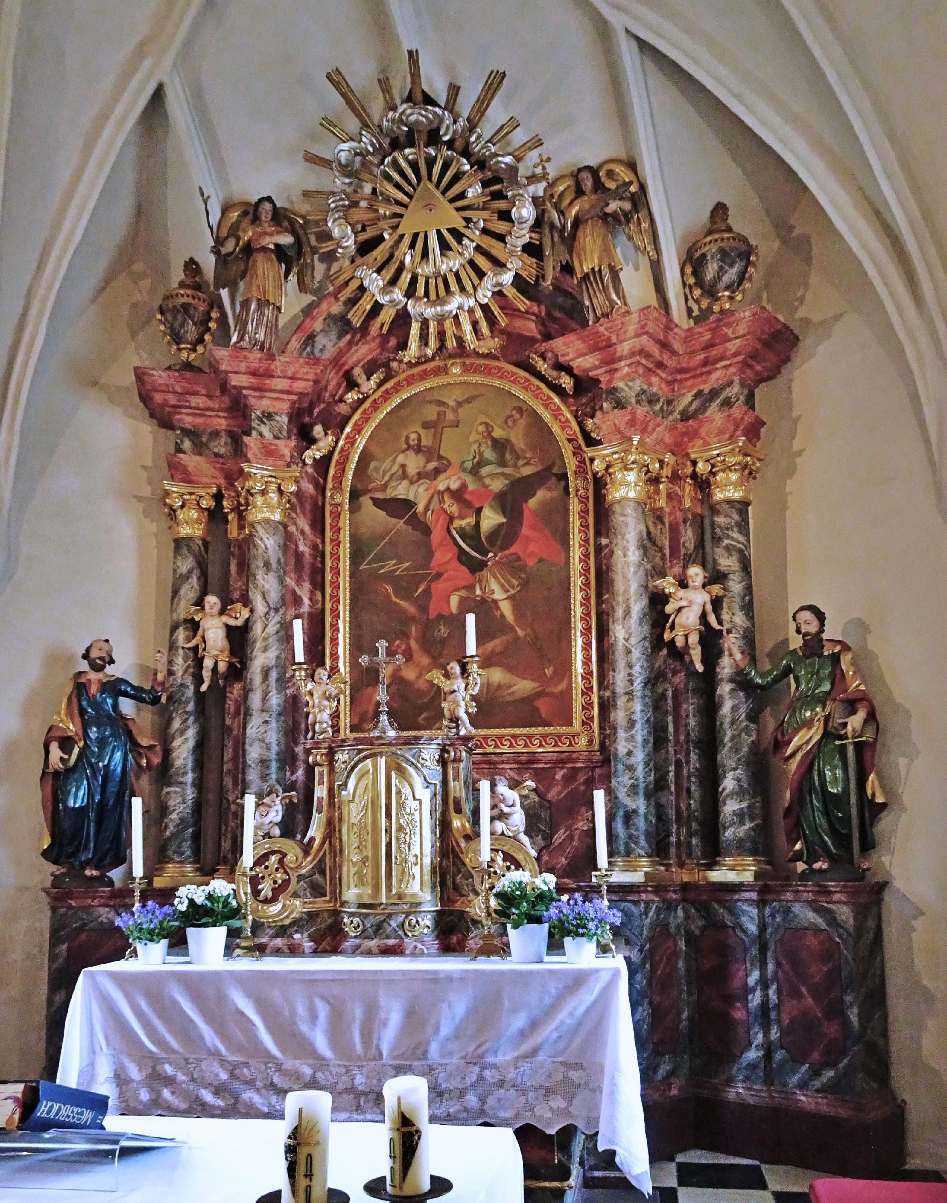 Kath. Pfarrkirche Si. Michael am Zollfeld (Maria Saal), der Hochaltar